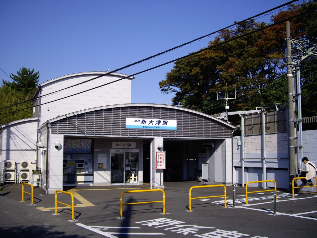 京浜急行新大津駅 駅舎